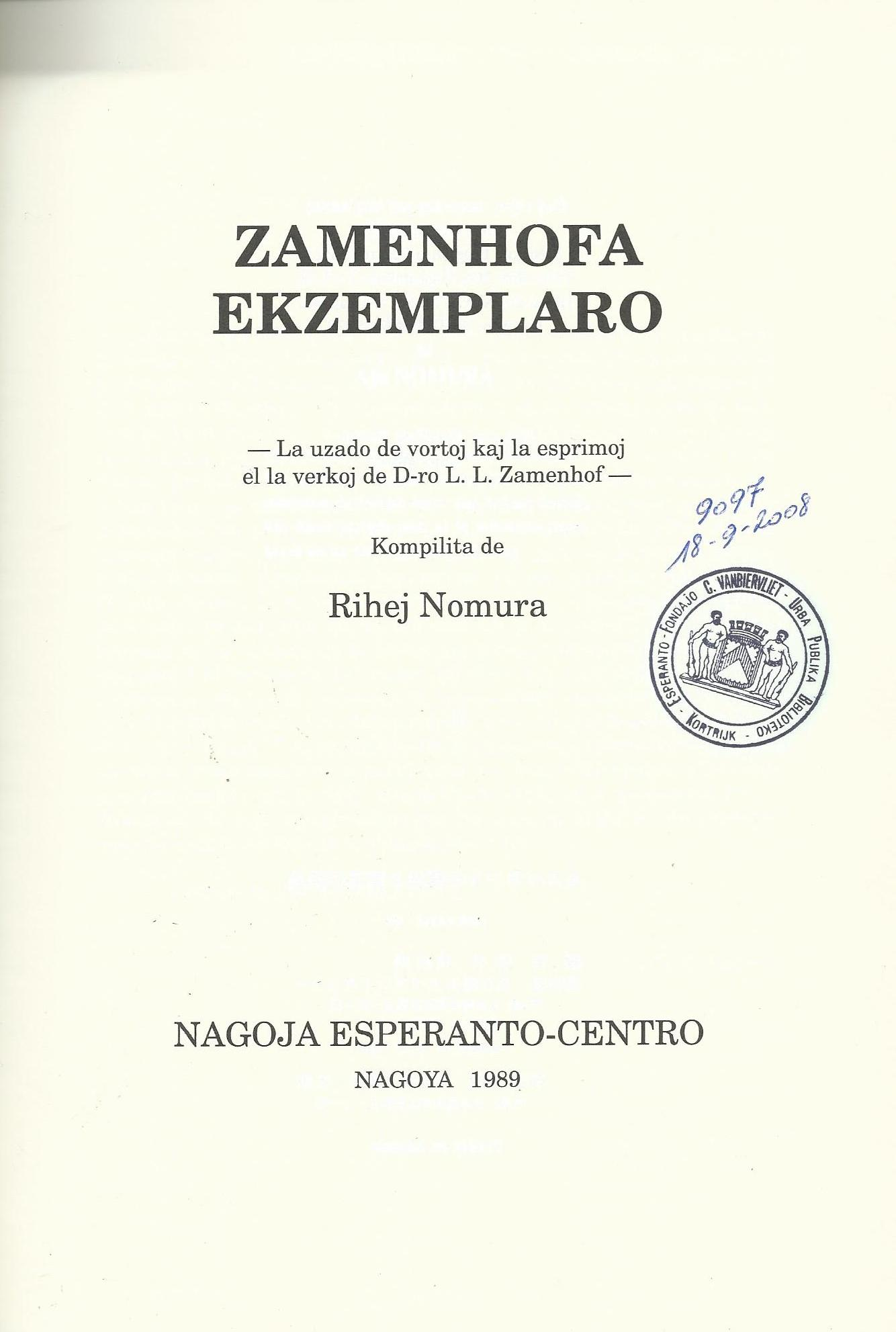 Librokovrilo de "Zamenhofa Ekzemplaro", 1989